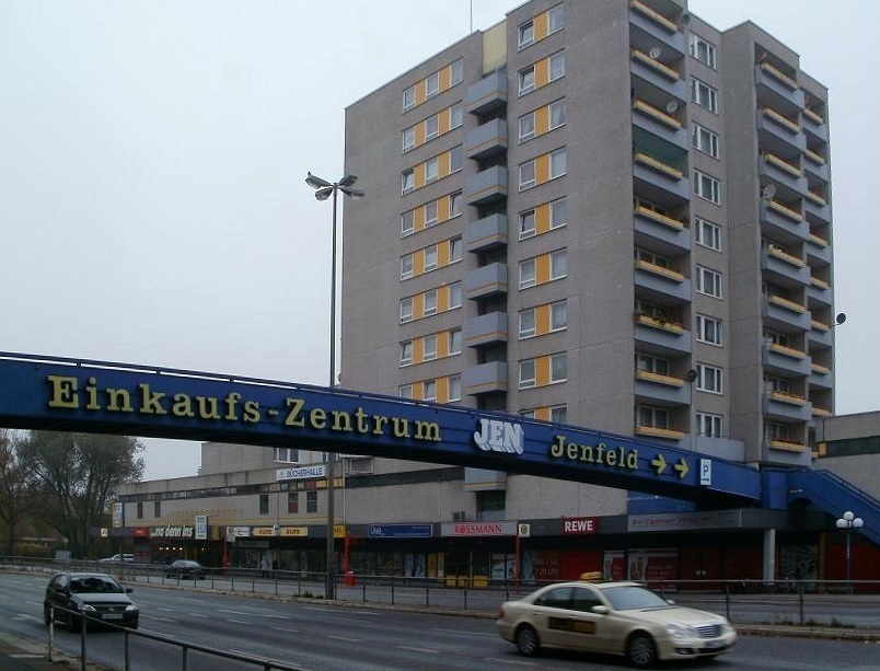 Einkaufszentrum JEN in Hamburg-Jenfeld.